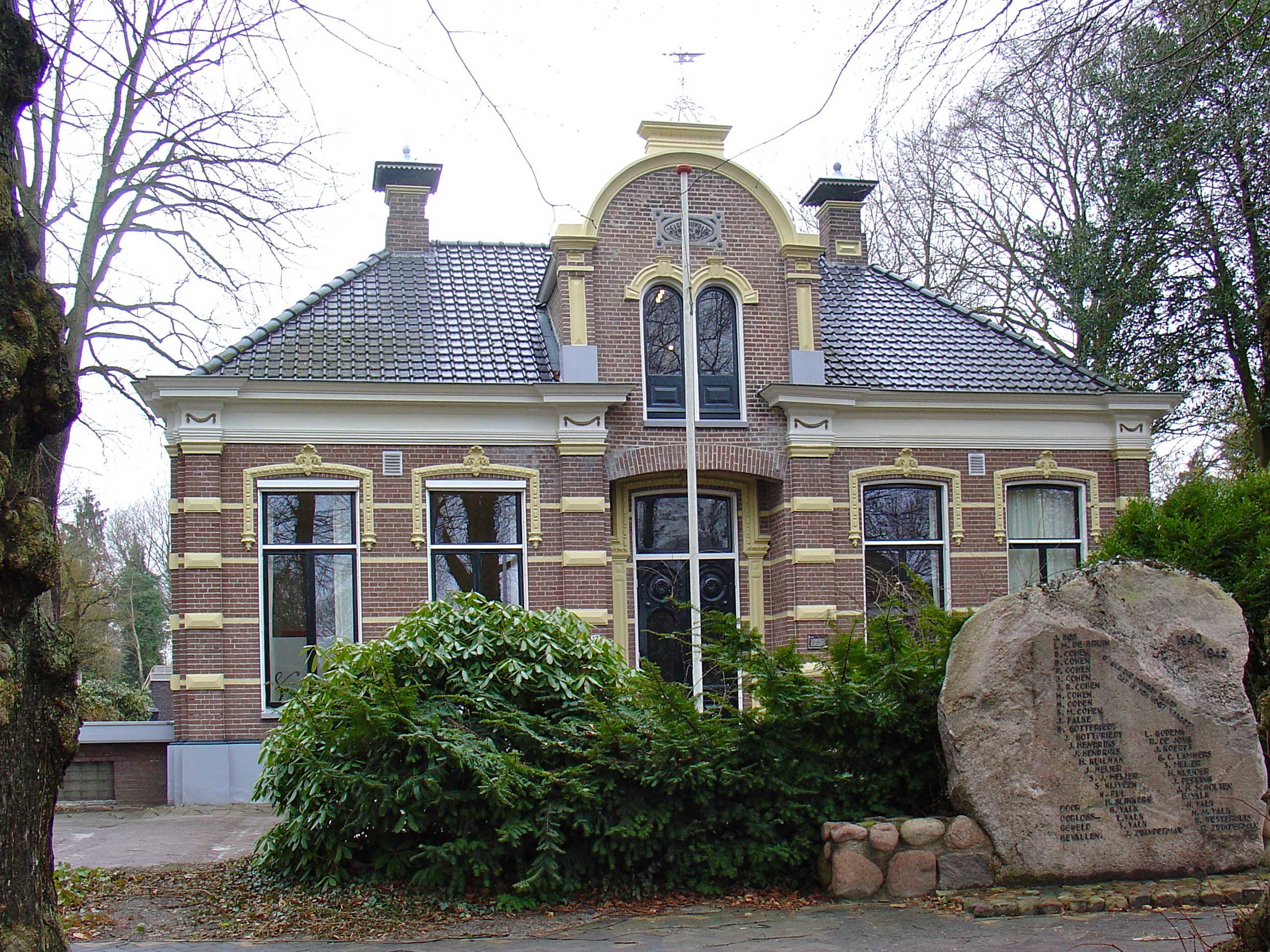 Voormalig gemeentehuis aan de Brink te Gieten